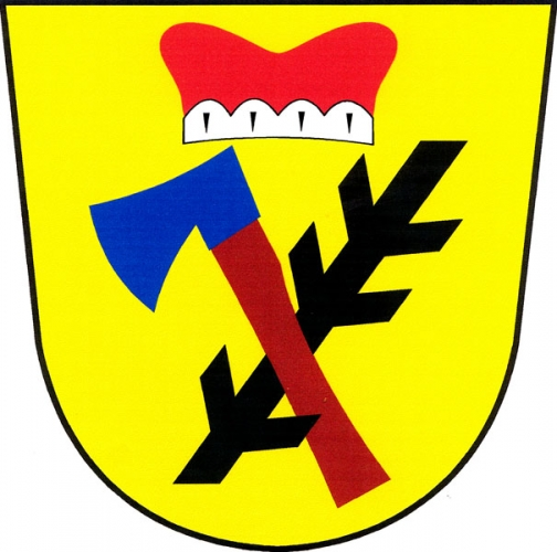 znak, Rosička, okres Žďár nad Sázavou